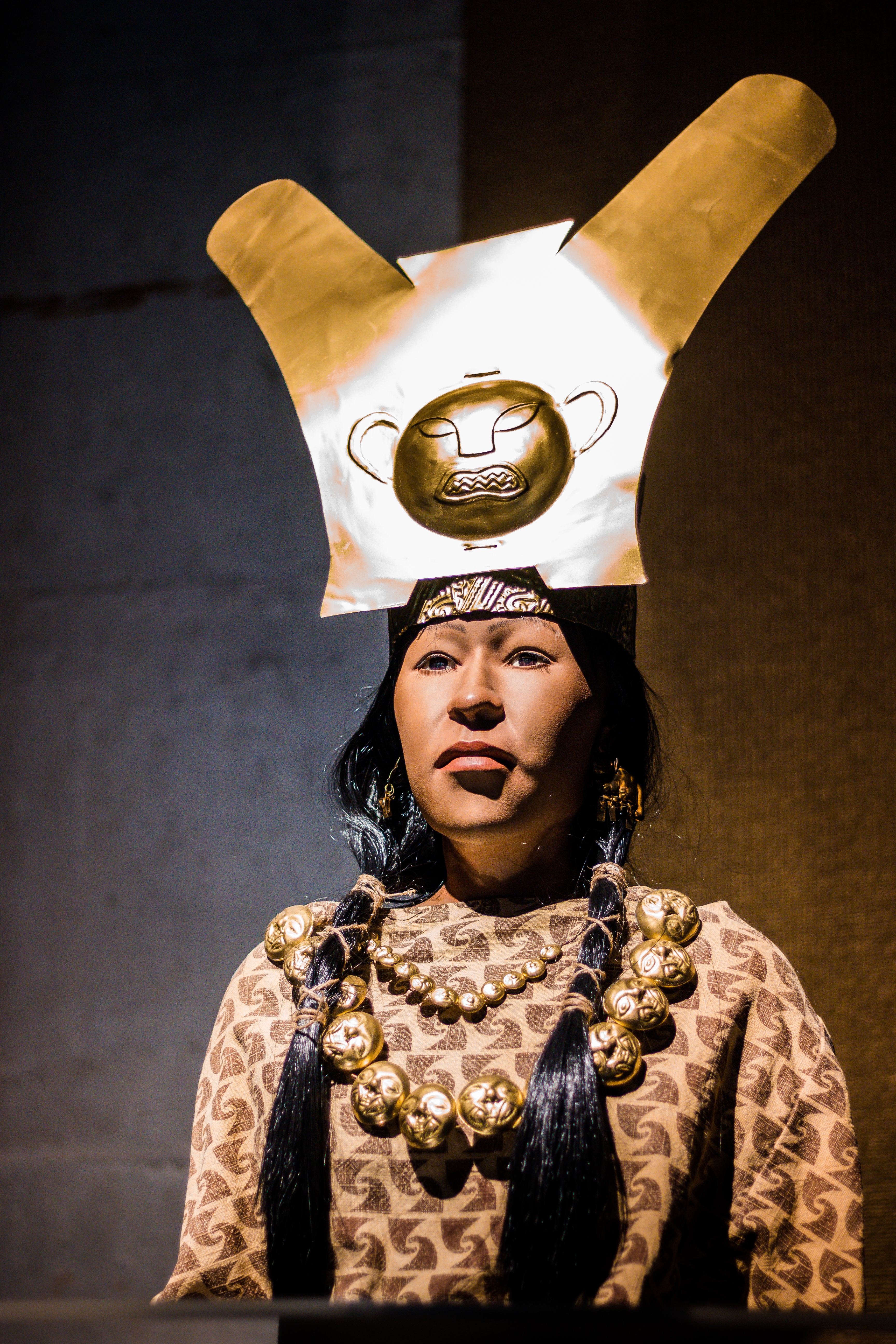 Sala 7 "La Señora de Cao" Esta sala está dedicada exclusivamente a la Señora de Cao, poderosa mujer que lideró el valle de Chicama hace 1700 años. En esta sala se encontrará la réplica 3D de su rostro y su cuerpo momificado. Además, alberga el mismo cuerpo de la antigua líder moche, el que se conserva en una urna.